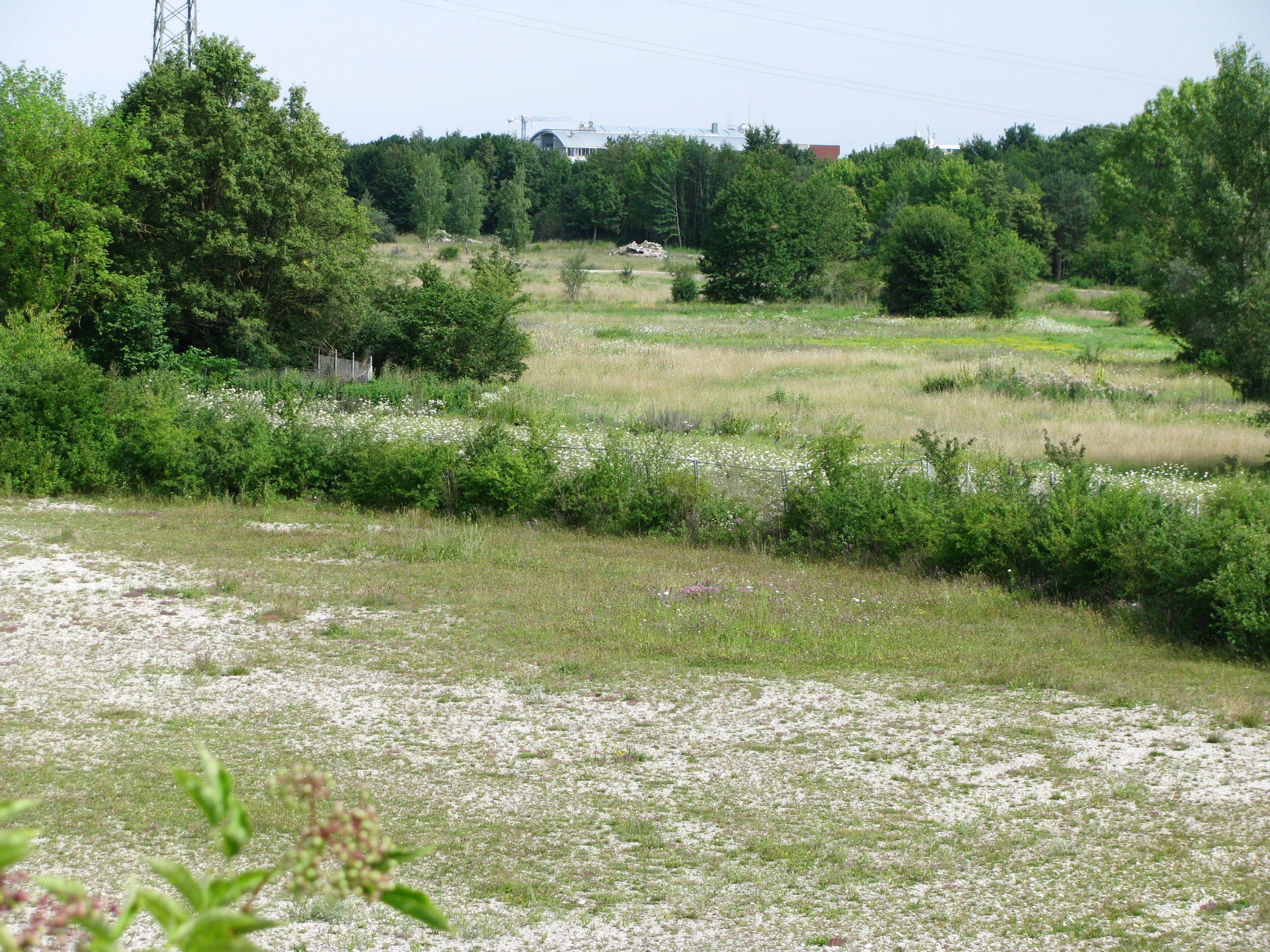 Ehemaliges Virginia-Depot.